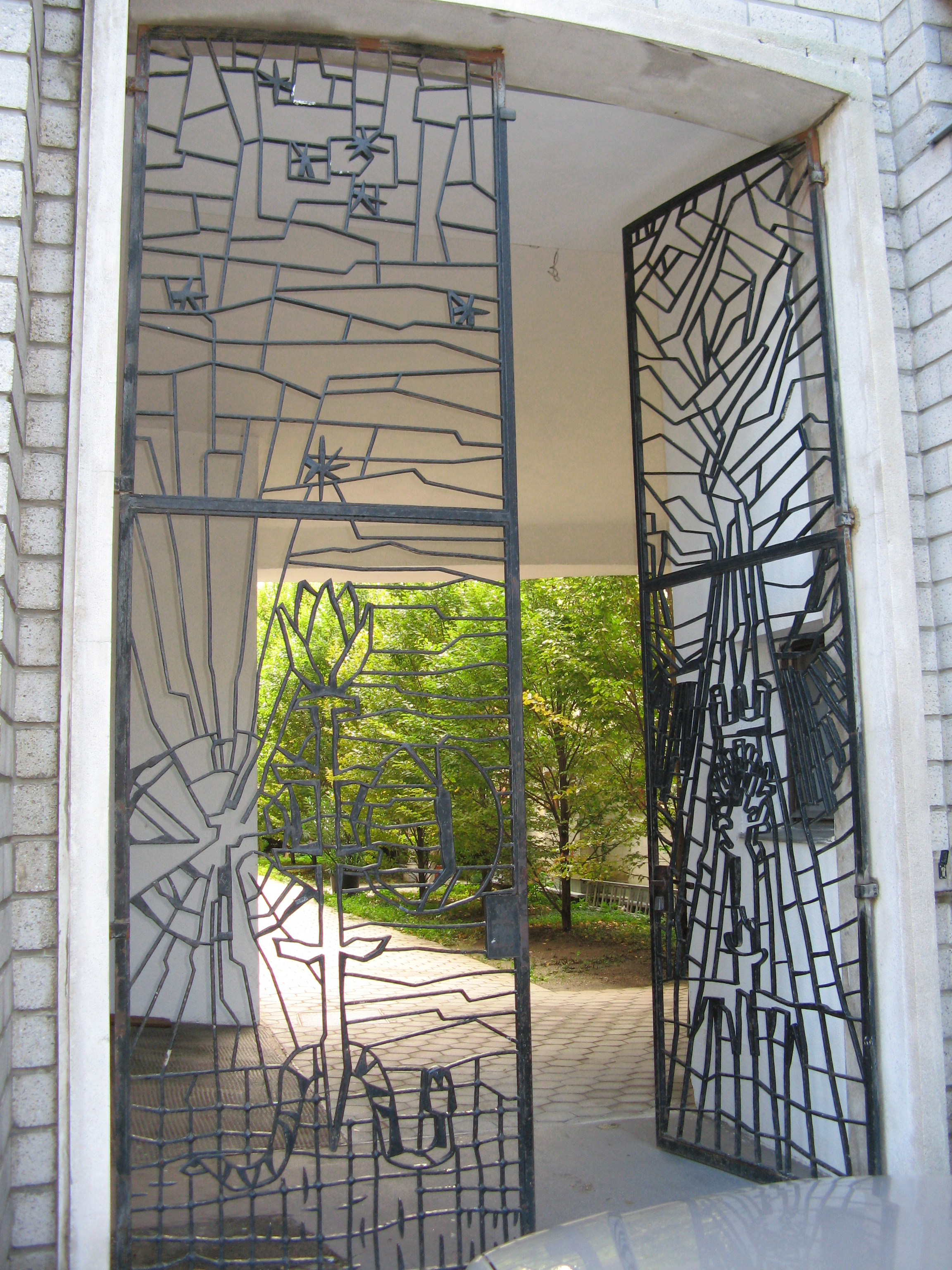 Gittertor der Kirche Maria Lourdes (1956-58) von Robert Kramreiter in Wien-Meidling